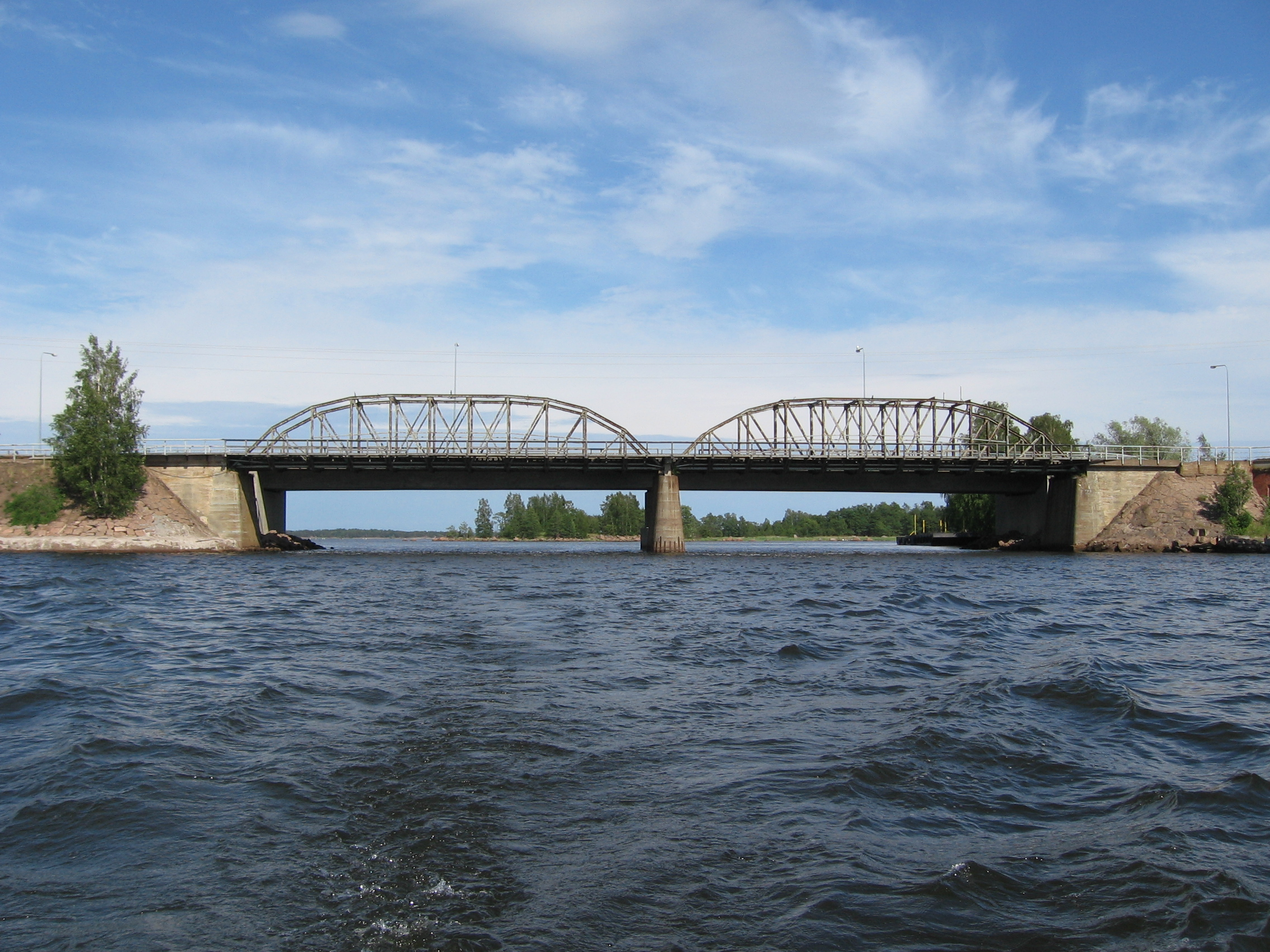 Hallan käytöstä poistettu rautatiesilta Popinniemen ja Hallan välillä Karhusalmessa Kotkassa. Sillan takana on käytössä oleva maantiesilta.